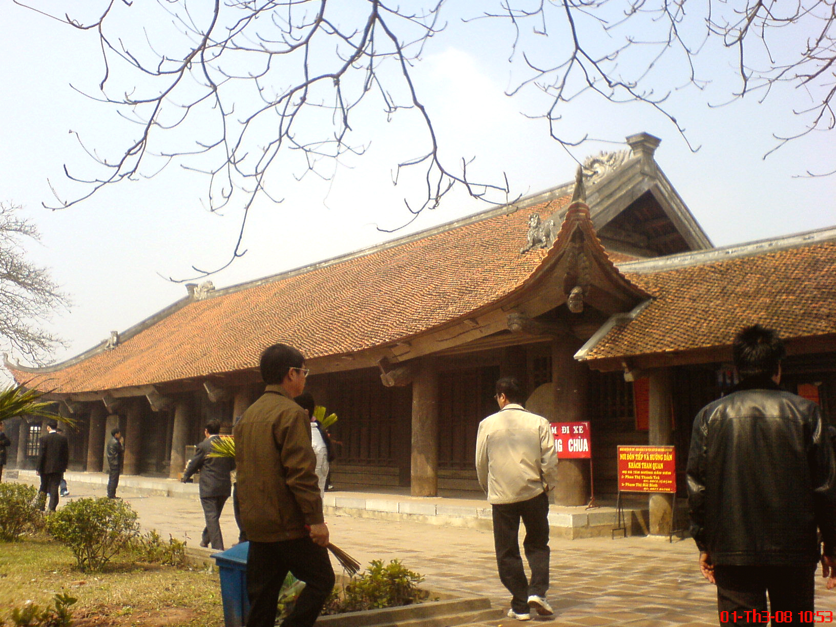 Keo Pagode - Thai Binh - Viet Nam